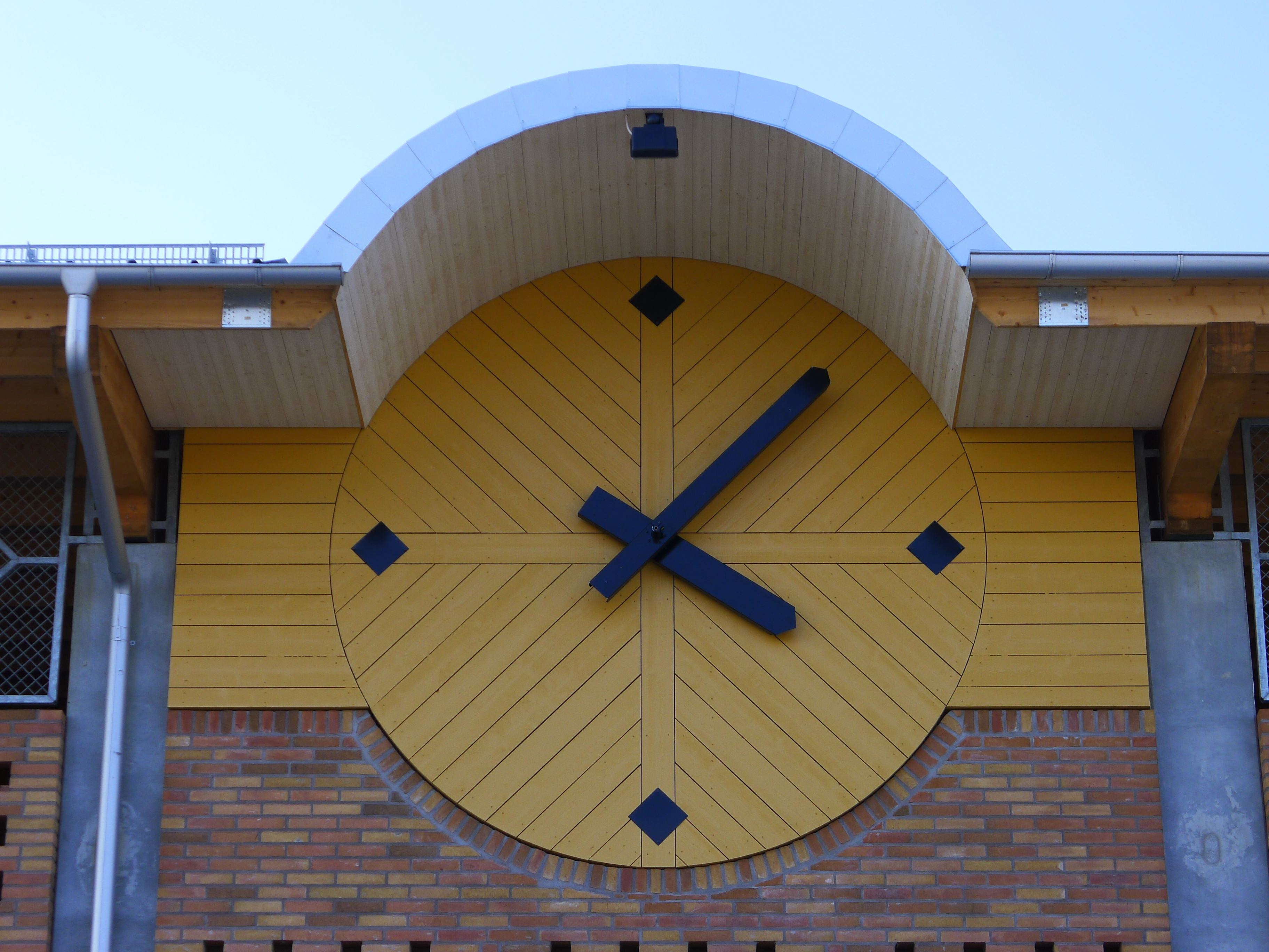 Fasadur på parkeringshus vid Högevallsbadet i Lund